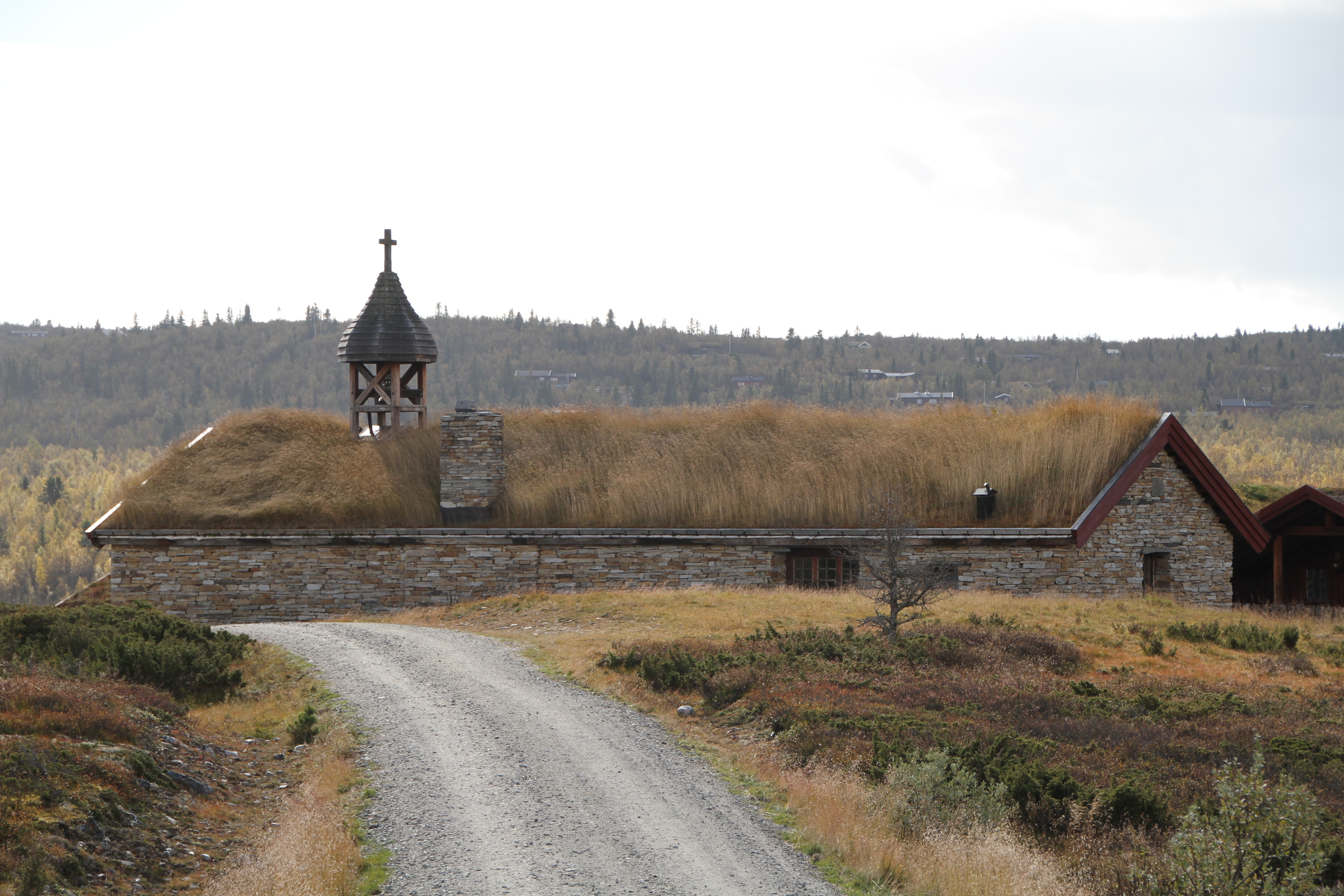 Lunde kyrkje, or Ringebu fjellkirke (mountain church), Venabygdsfjell. Oppland. Norway